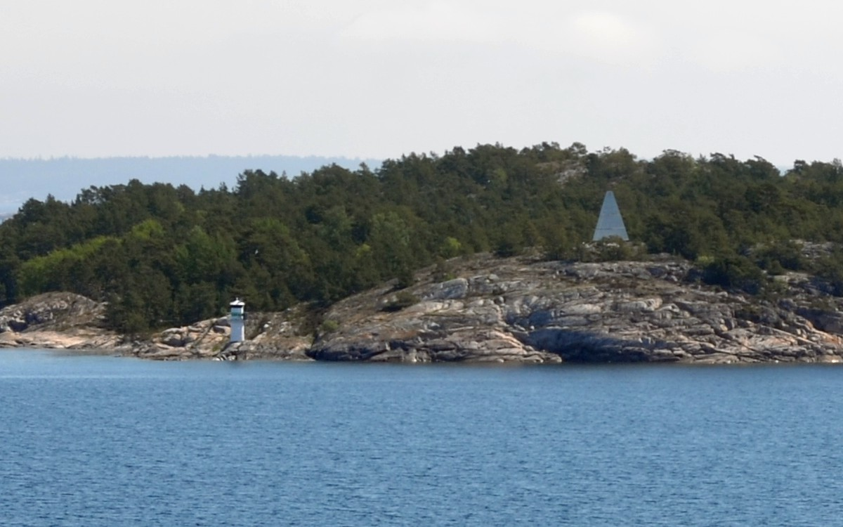 Fyren och sjömärket på Mysingeholm i Mysingen i Stockholms skärgård.